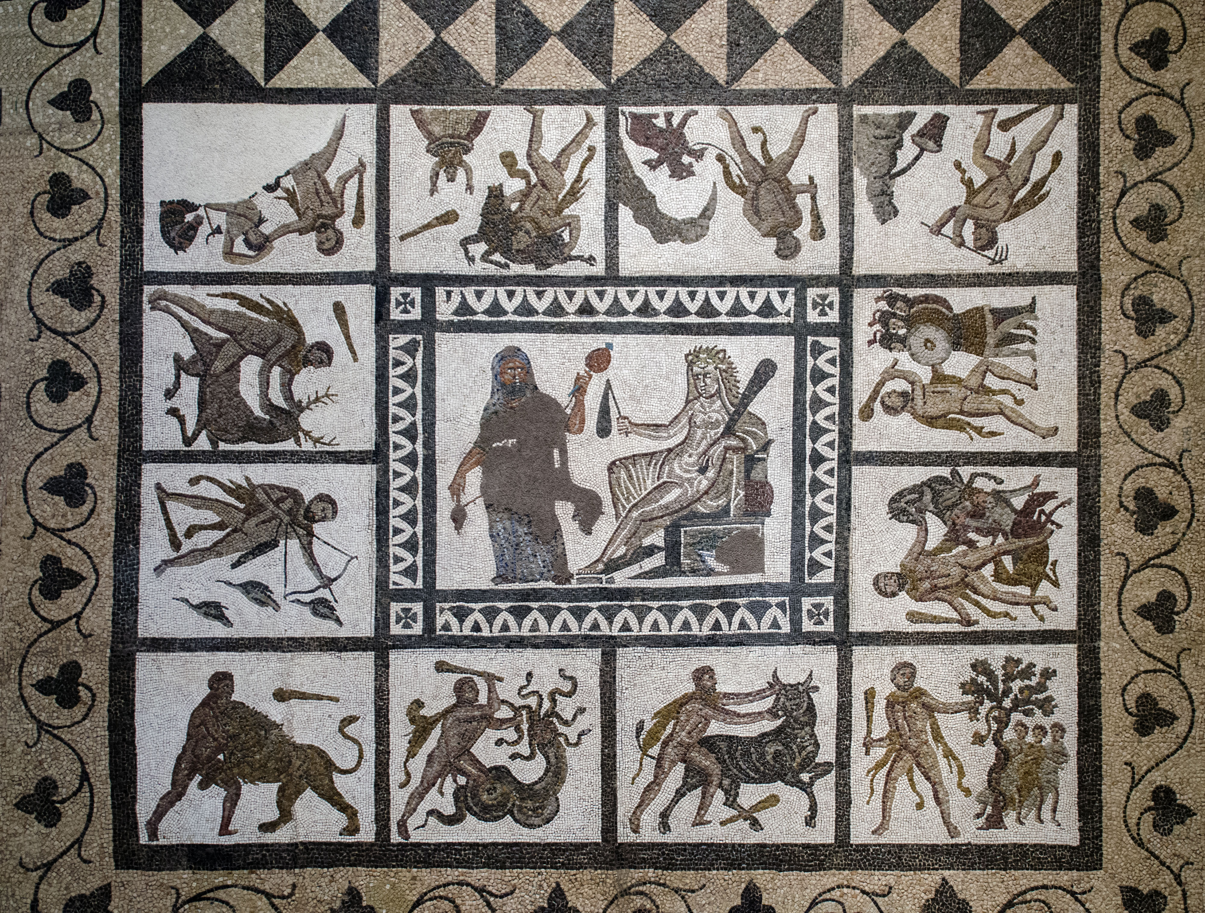 Mosaico del siglo III realizado en caliza y procedente de Liria, Valencia.